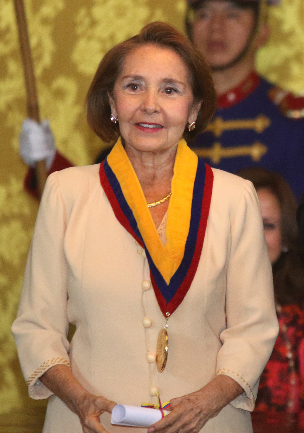 Quito 10 Ago (Andes).- César Dávila Vázquez, Beatriz Parra y Manuel Cruz se hicieron acreedores del galardón mas alto del gobierno ecuatoriano, el premio Eugenio Espejo por su desempeño y labor trascendental en la república. Fotografías: Carlos Rodríguez/Andes. Quito 10 Ago (Andes).- César Dávila Vázquez, Beatriz Parra y Manuel Cruz se hicieron acreedores del galardón mas alto del gobierno ecuatoriano, el premio Eugenio Espejo por su desempeño y labor trascendental en la república. Fotografías: Carlos Rodríguez/Andes.